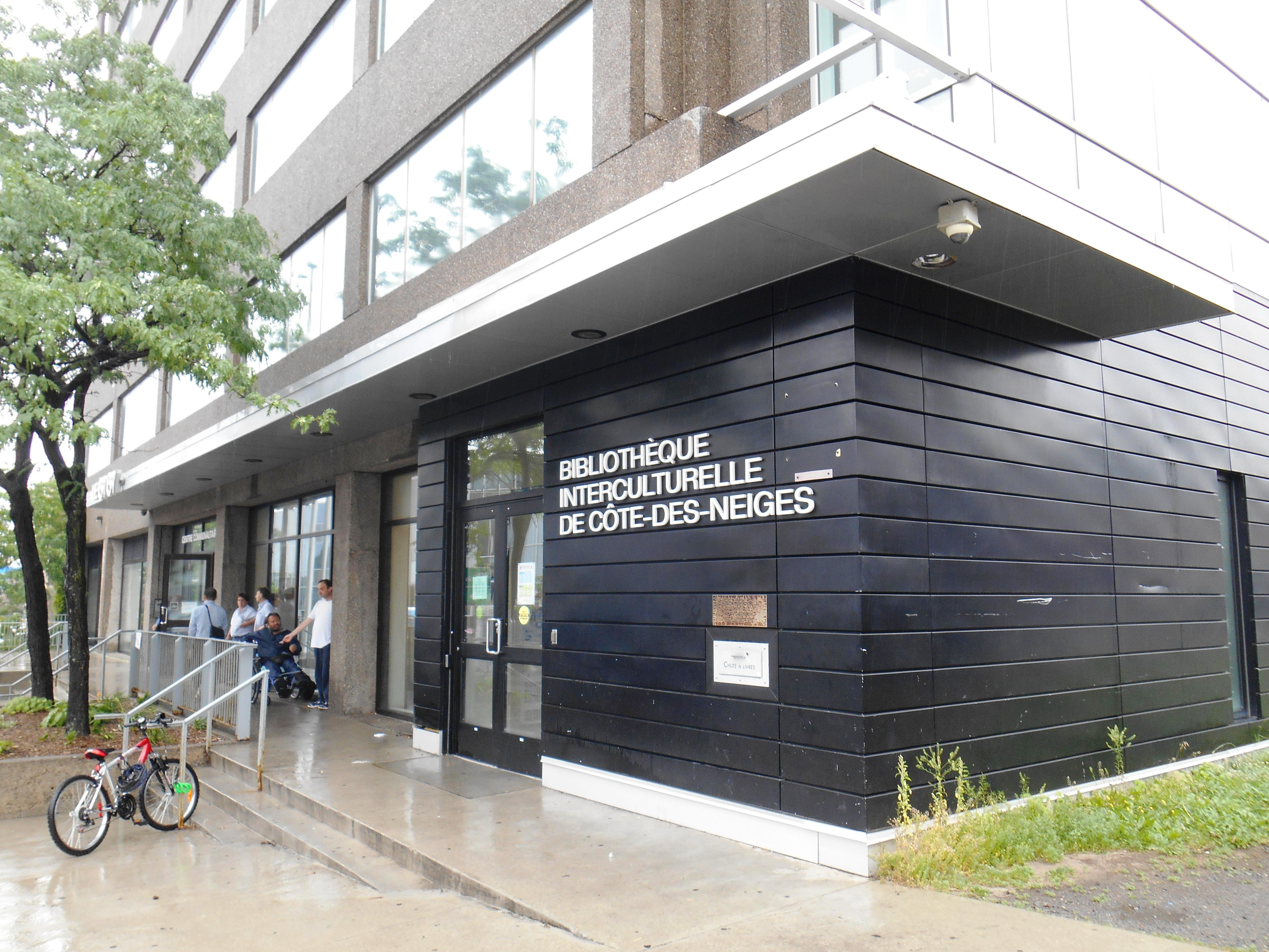 Bibliothèque interculturelle, 6767, chemin de la Côte-des-Neiges, Montréal